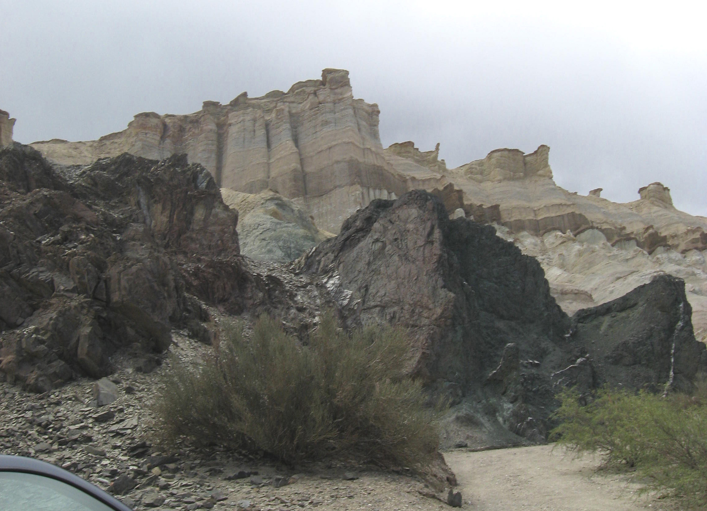 Description=Cerro Alkázar, situado en Dpto. Calingasta de la Pcia. de San Juan en Argentina. Monumento Natural. (Foto 2)